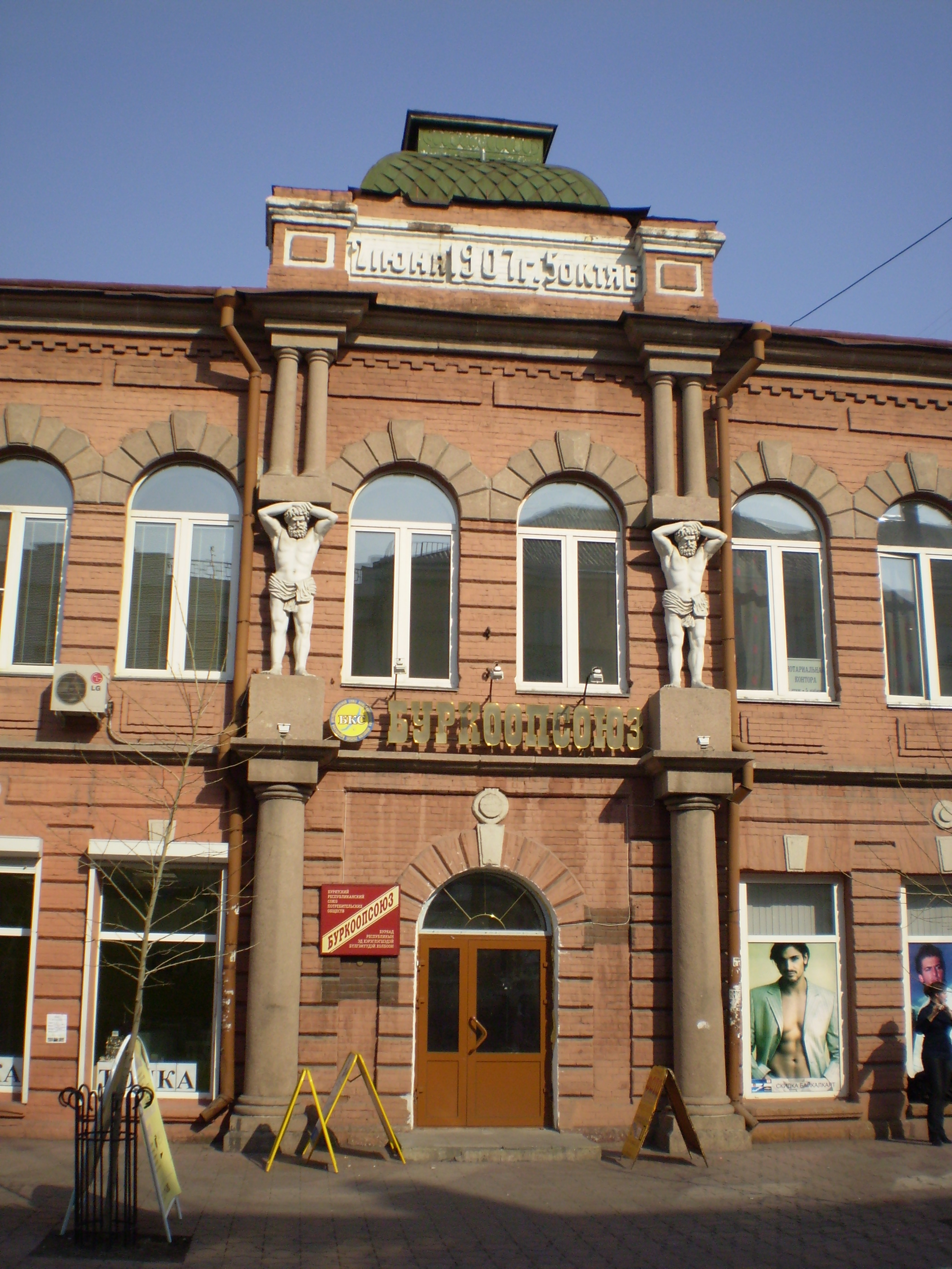 Дом купца Каппельмана